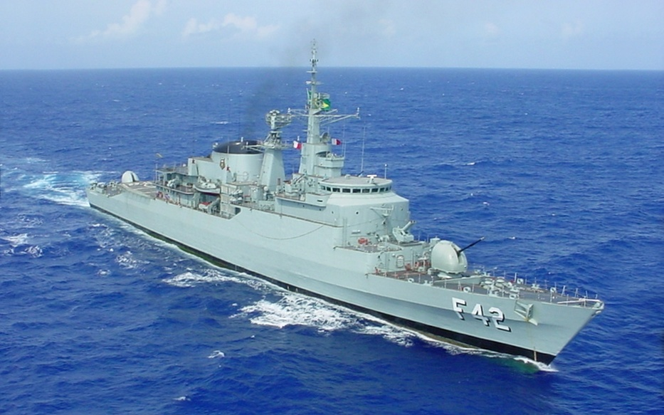 Fragata Constituição (F 42) da Marinha do Brasil.